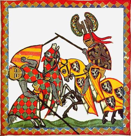 Codex Manesse, UB Heidelberg, Cod. Pal. germ. 848, fol. 52r: Walther von Klingen